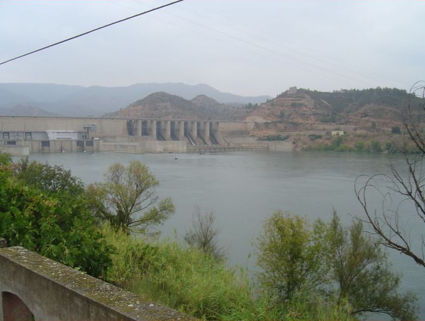 Pantà de Riba- roja